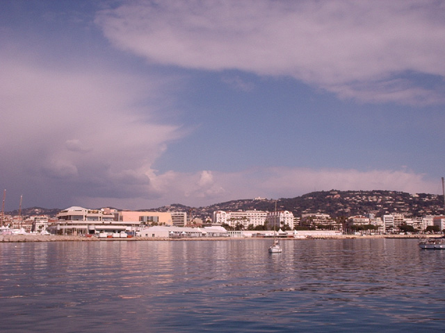 Collines des Gabres (quartier de la Californie), boulevard de la Croisette, hôtel Majestic et Palais des festivals et des congrès, depuis la baie de Cannes.